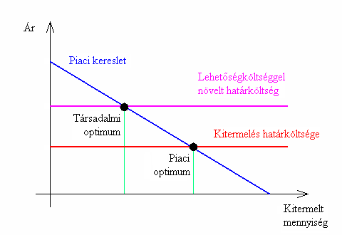 Nem megújuló természeti erőforrás felhasználásának magánpiaci és társadalmi optimuma